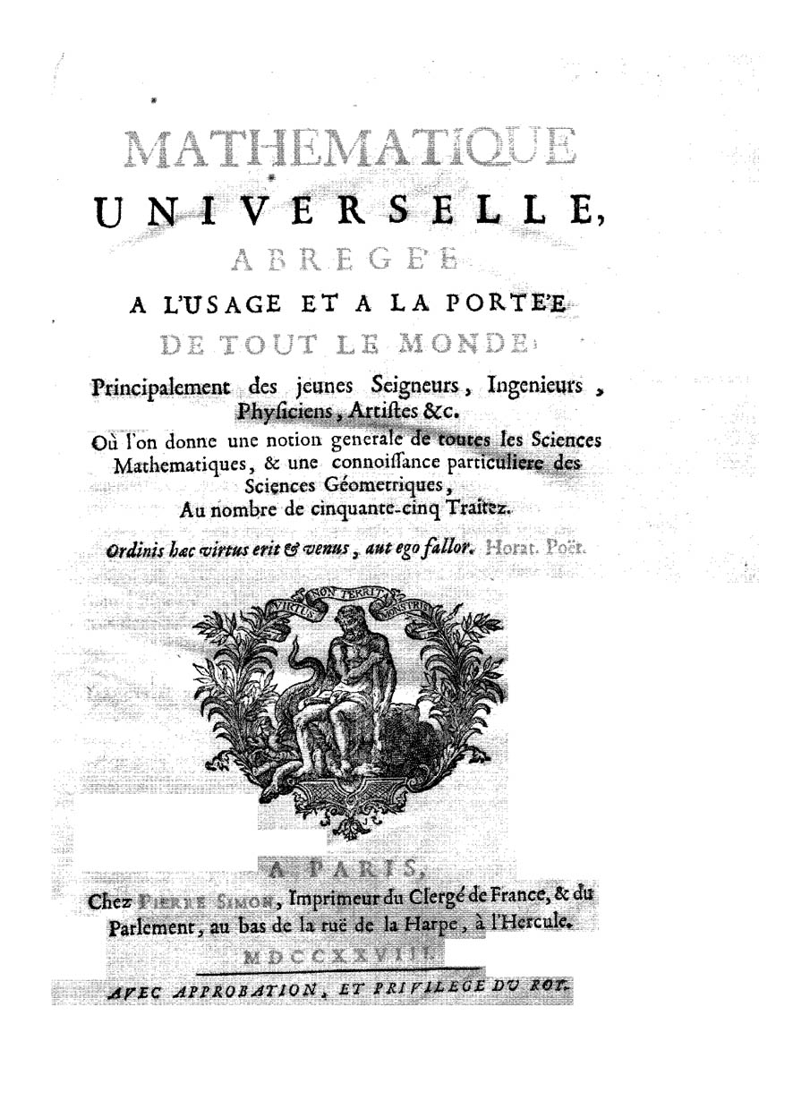 Frontespizio